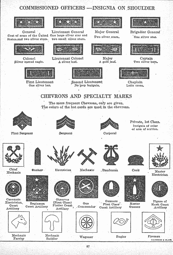 система званий армии США воремен I мировой войны